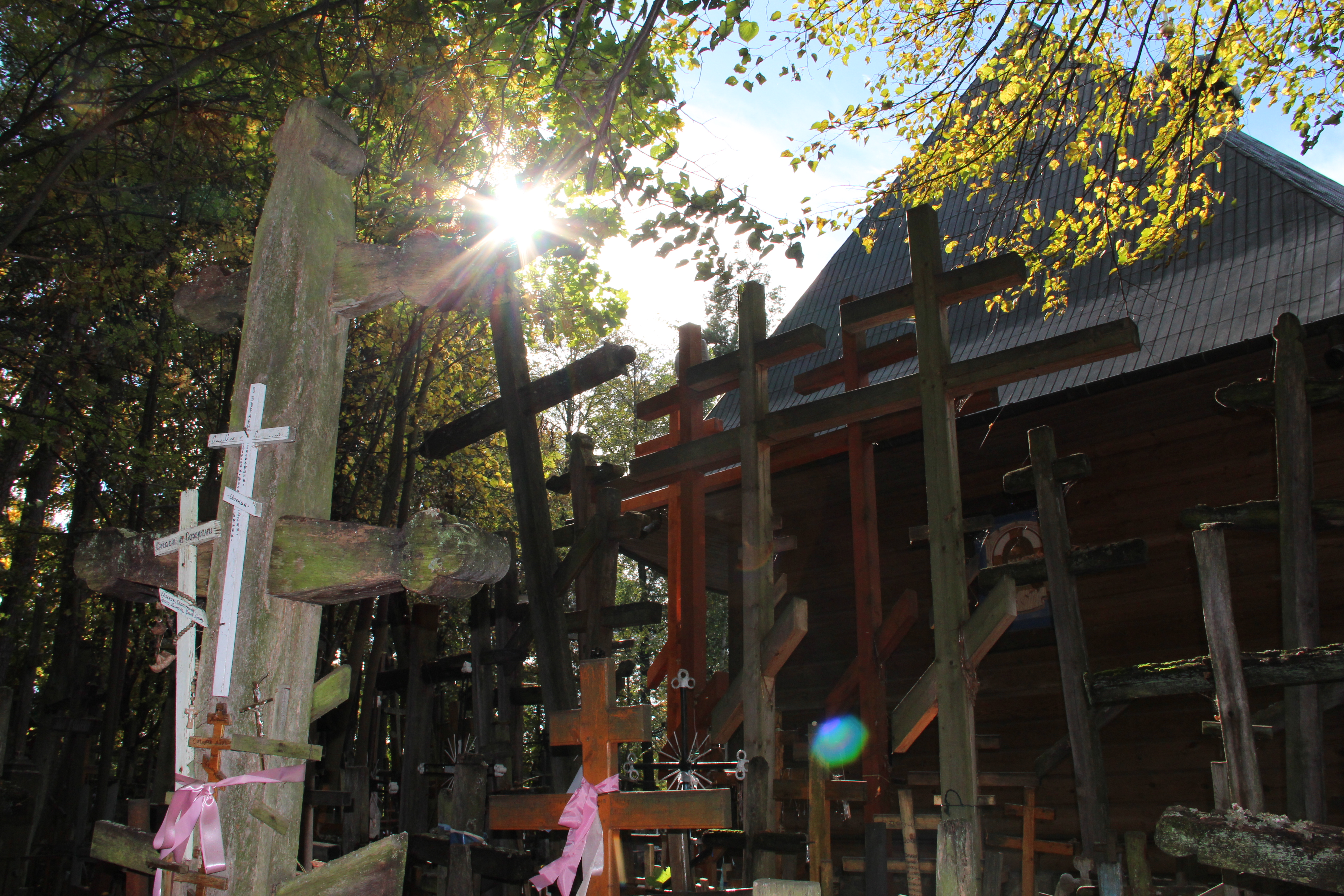 Prawosławne sanktuarium na Górze Grabarka w woj. podlaskim.